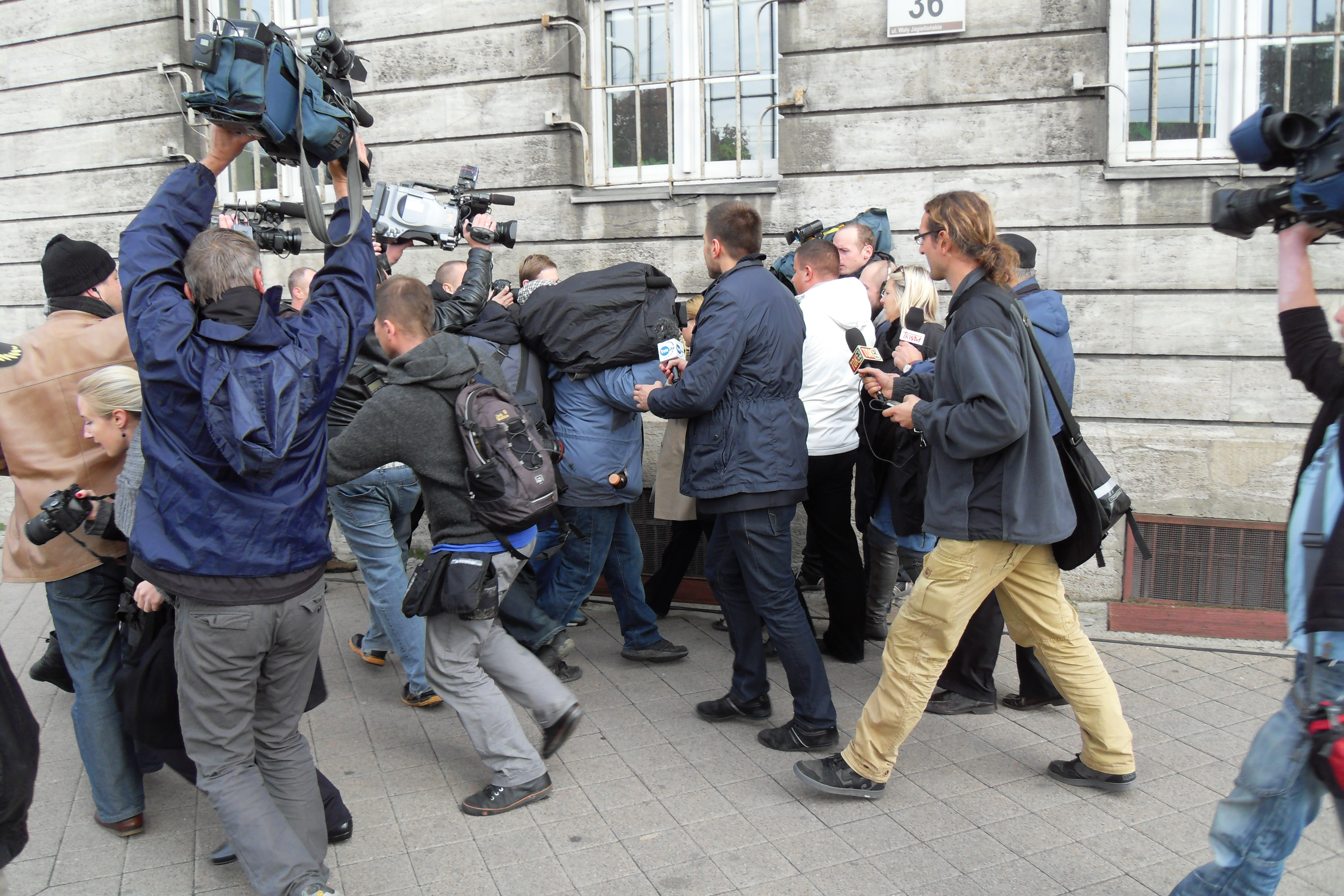 Gdańsk, ul. Wały Jagiellońskie. Katarzyna P. (Amber Gold) po przesłuchaniu w dniu 10 października 2012 w prokuraturze.